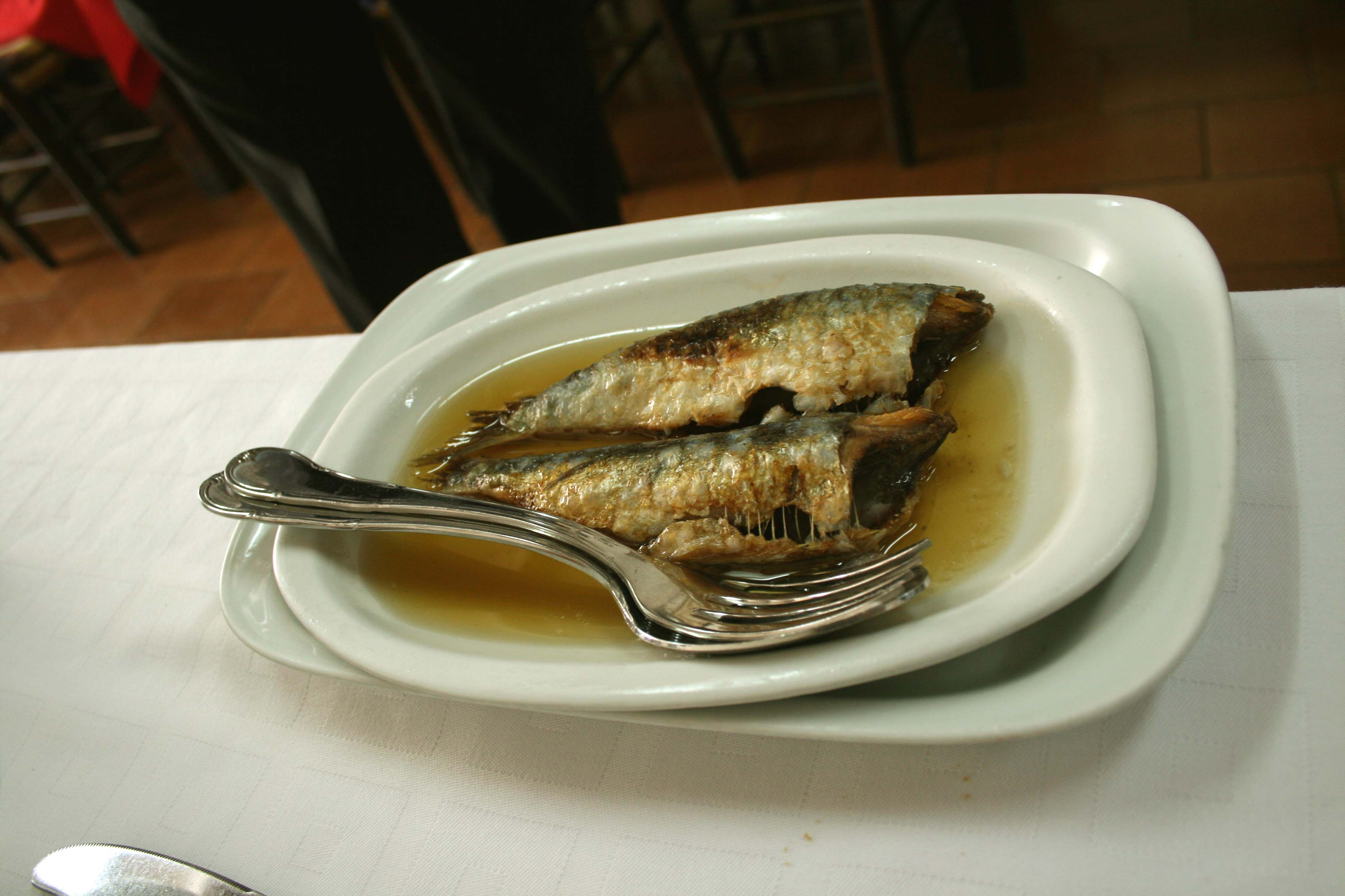 Sardinas rancias en aceite de oliva - Típicas de Fonda Alcalá - Calaceite - Teruel